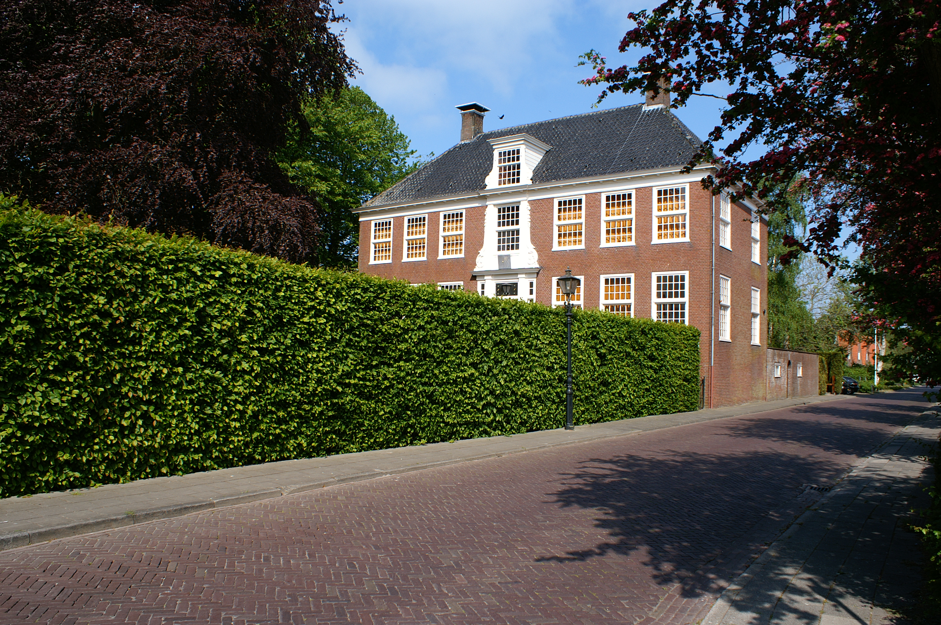 Osinga-State te Langweer.